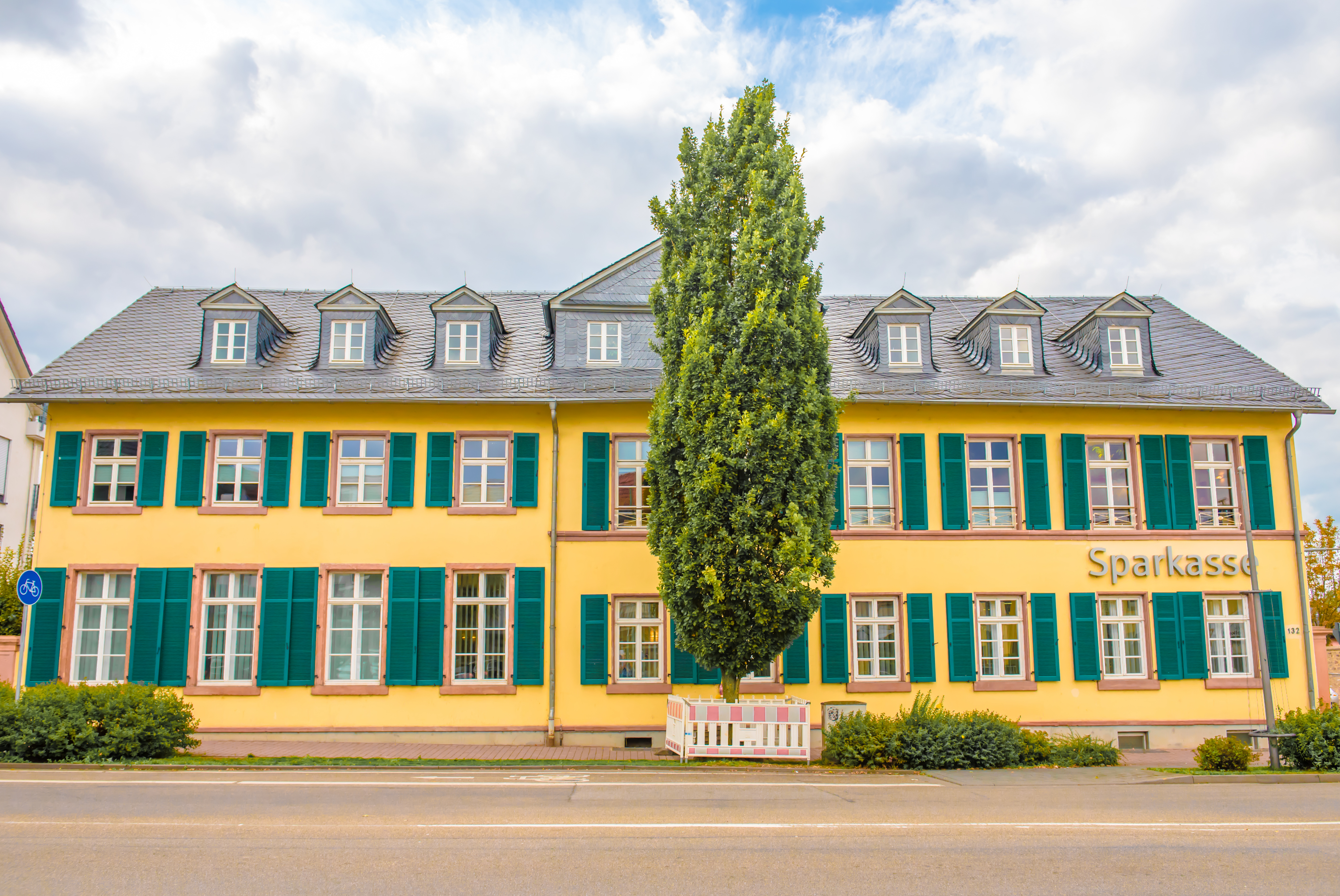 Frankfurter Straße 132, Bad Vilbel, Vorderansicht